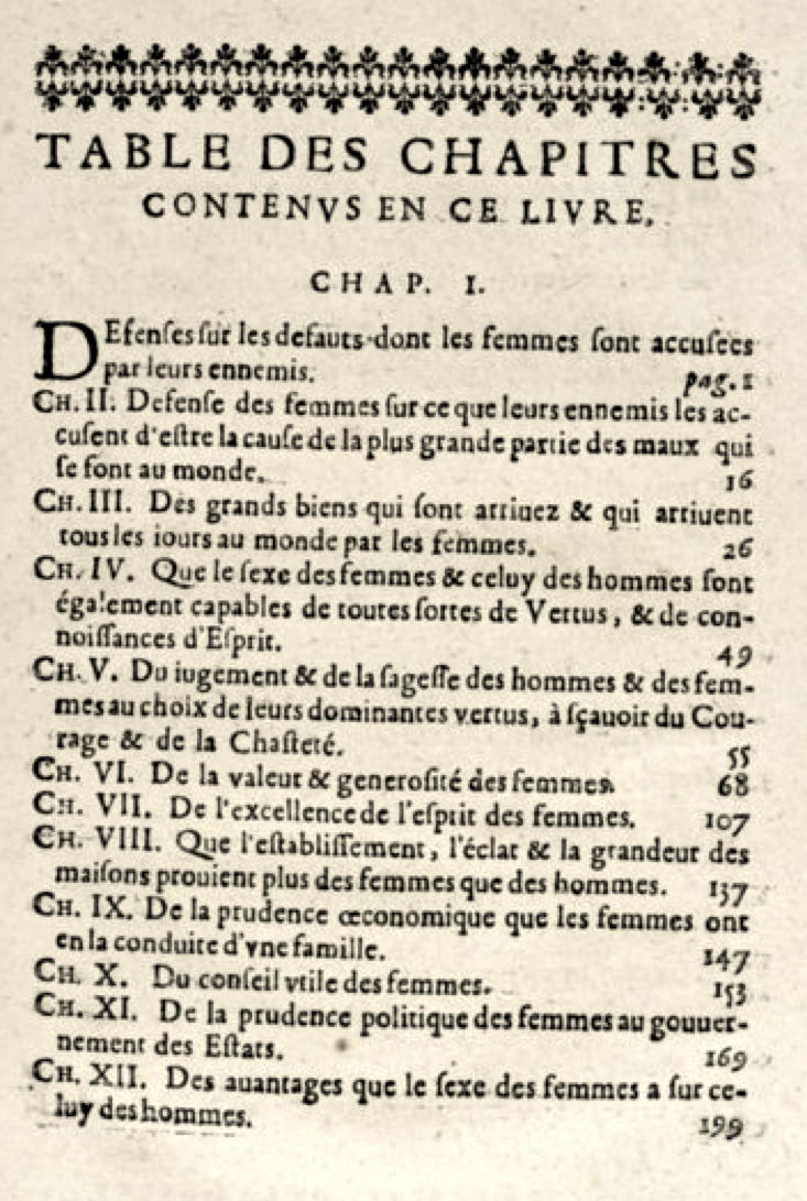 Tables des matières du Triomphe des dames